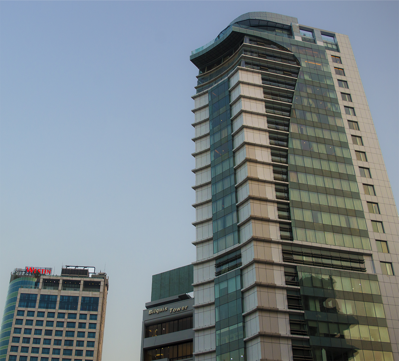 Dhaka